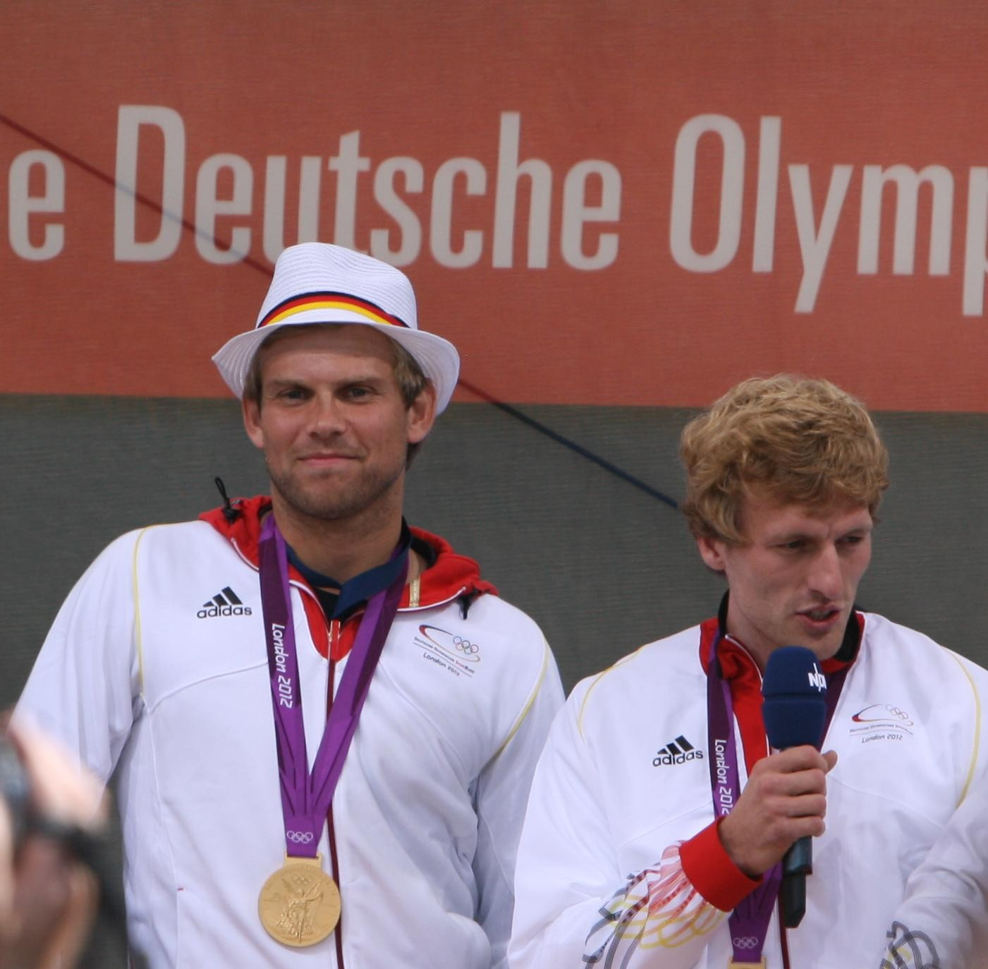 Empfang der Olympioniken 2012 in Hamburg